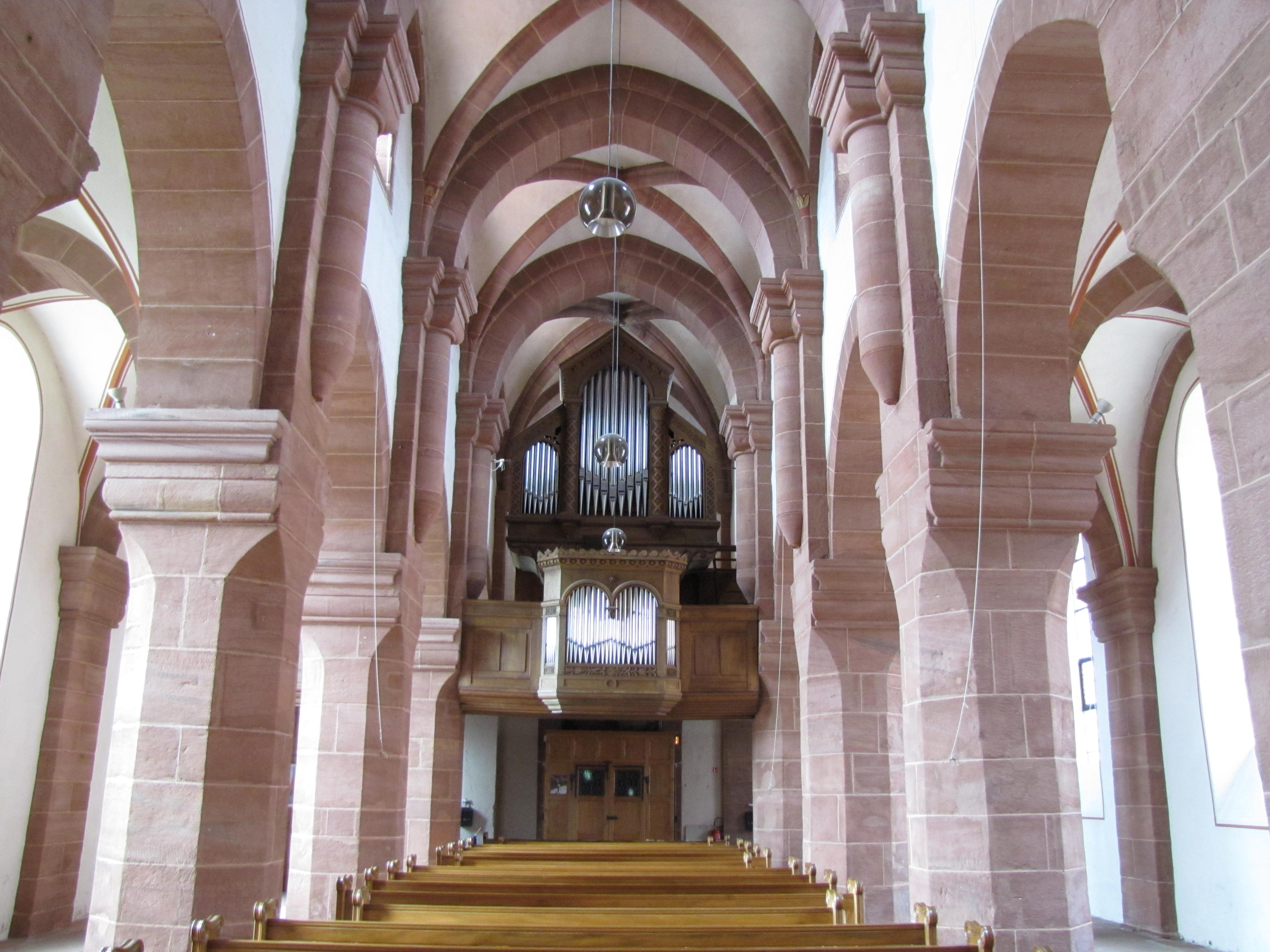 Alsace, Bas-Rhin, Neuwiller-lès-Saverne, Église protestante Saint-Adelphe (PA00084821, IA67009915): Vue intérieure de la nef vers la tribune d'orgue.